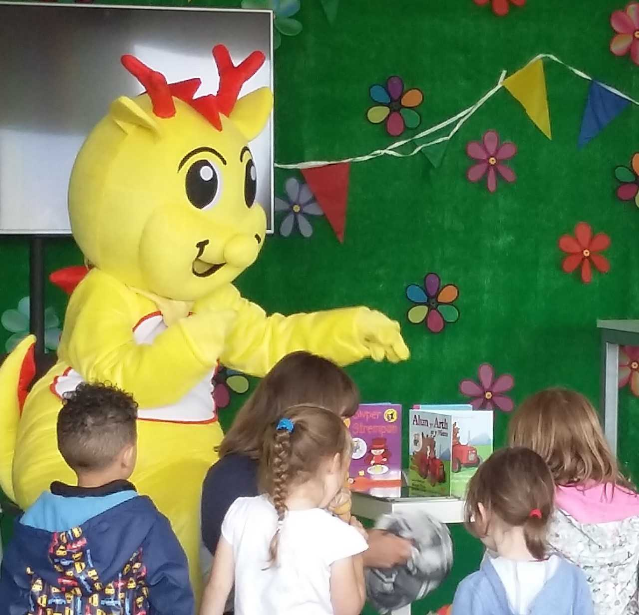 Gweithgaredd Selog